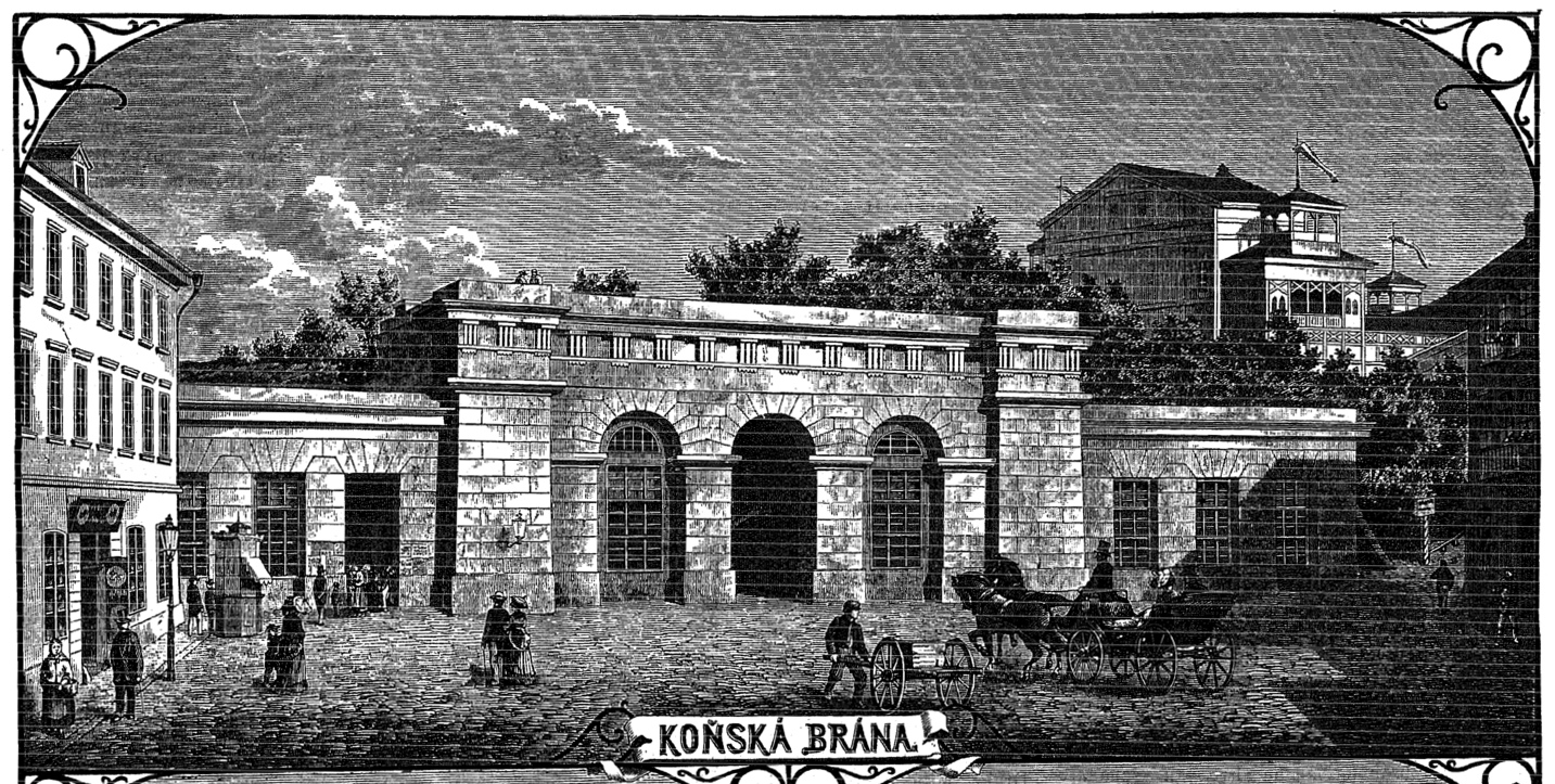 Vyobrazení Koňské brány v časopise Světozor v roce 1874, číslo 38, strana 449. Nakreslil F. Biza.